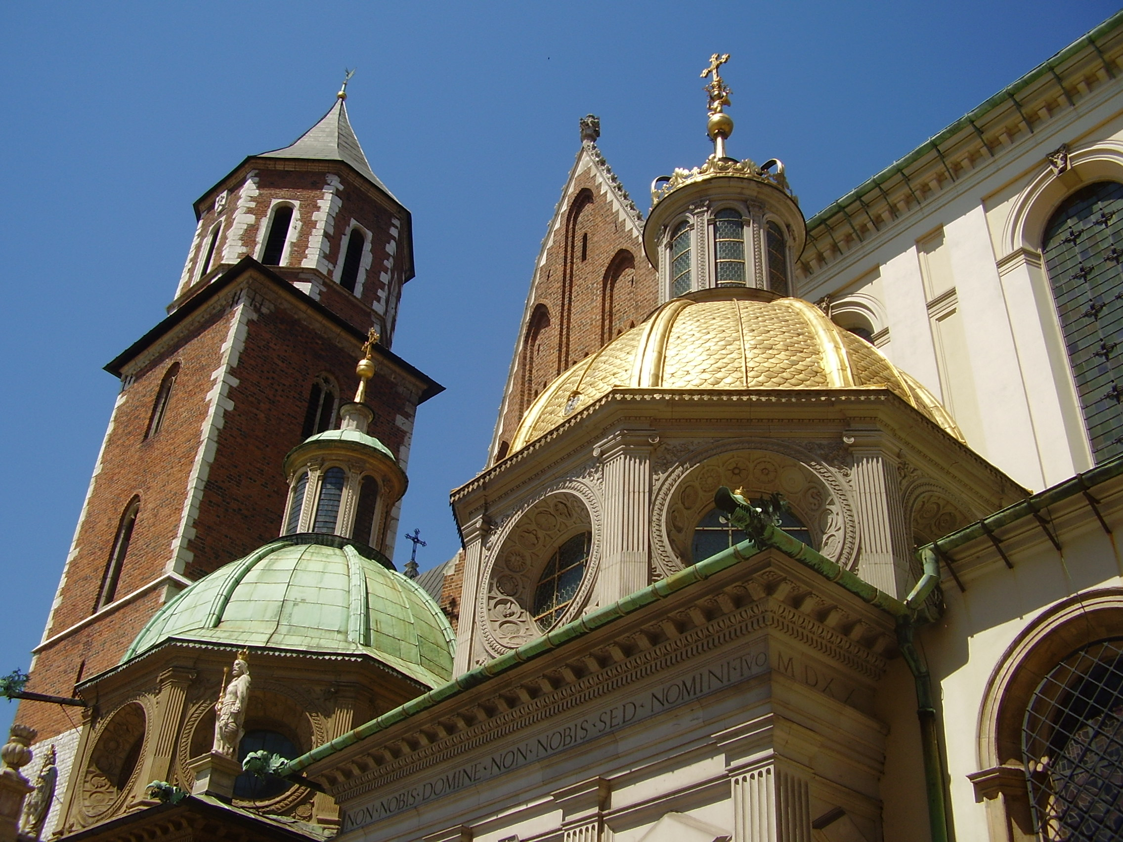 Kraków, Poland